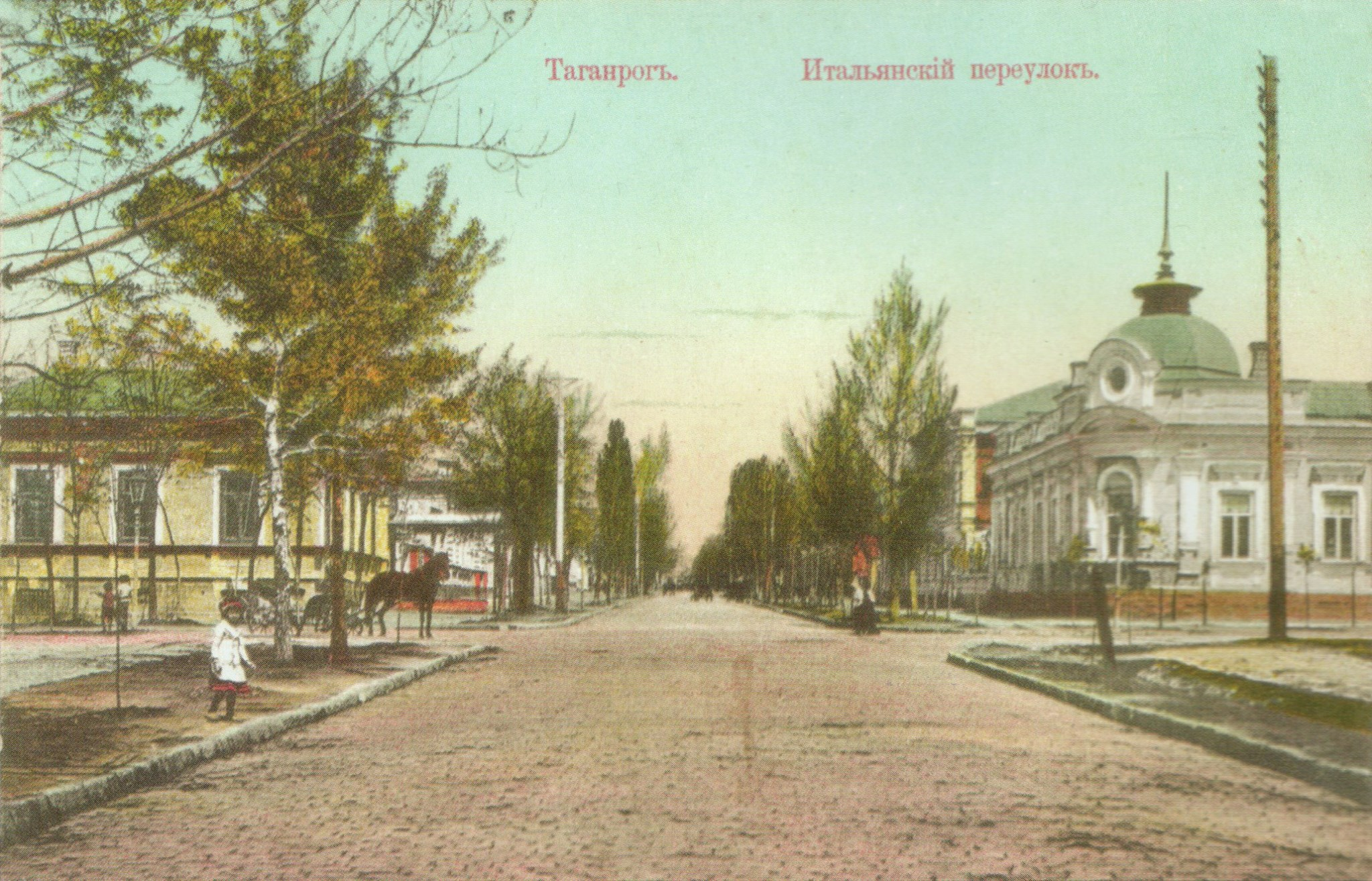 Итальянский переулок, Таганрог Ростовская область РФ